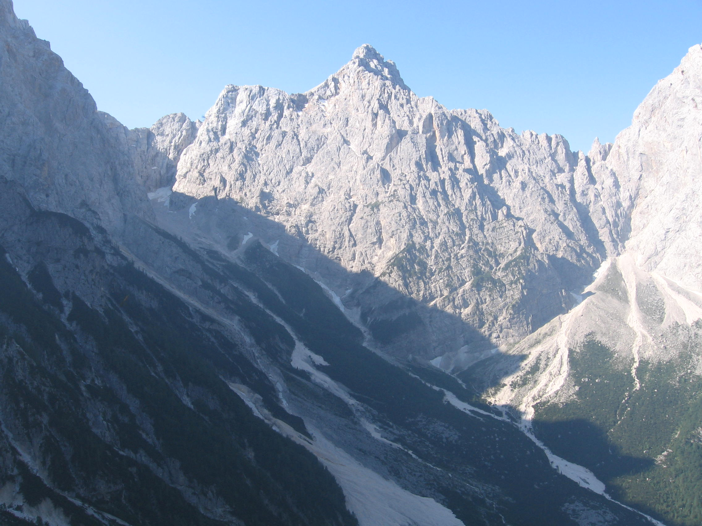 Razor Krnice